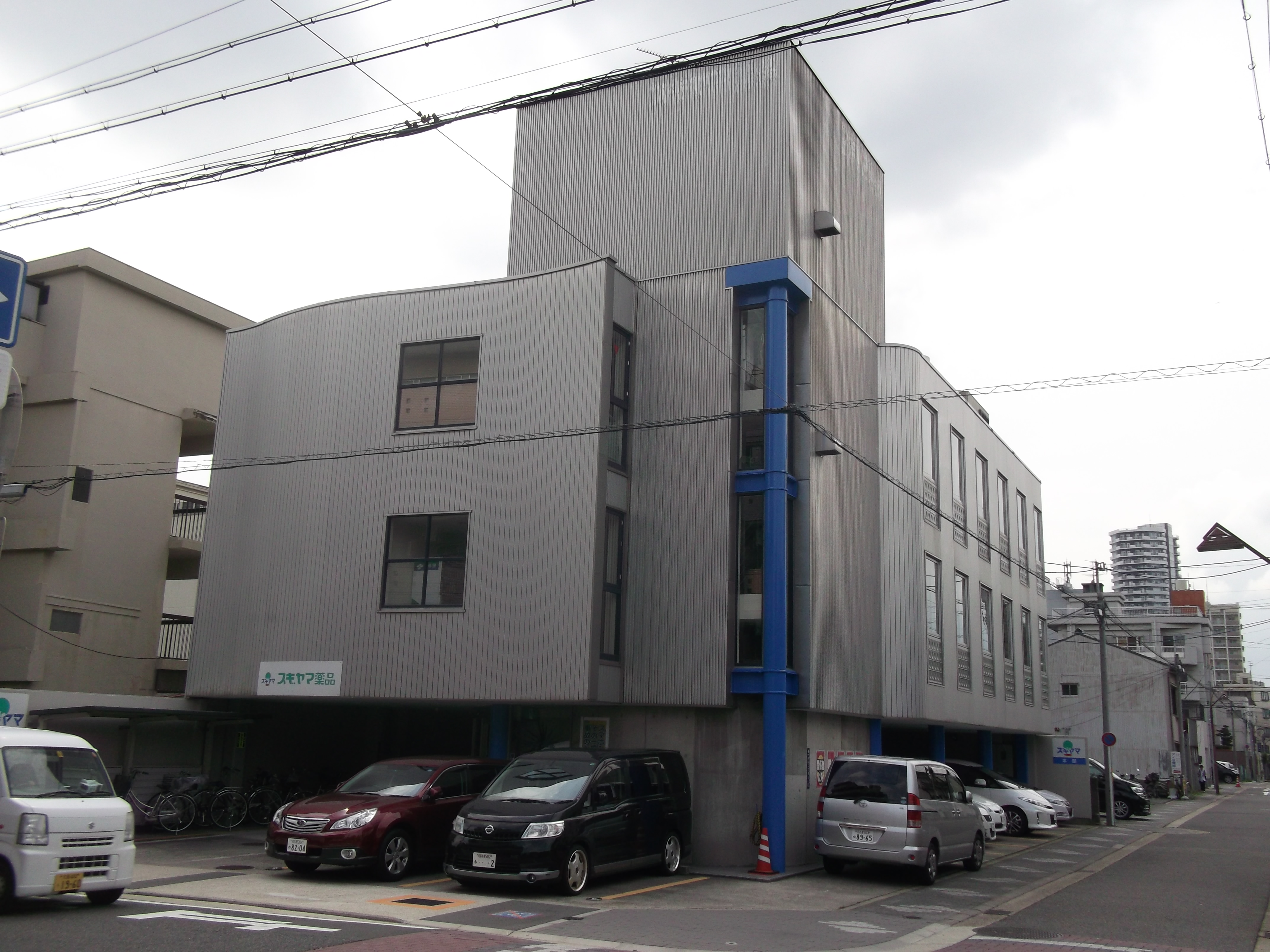 名古屋市千種区のスギヤマ薬品本社を東側公道北側より撮影